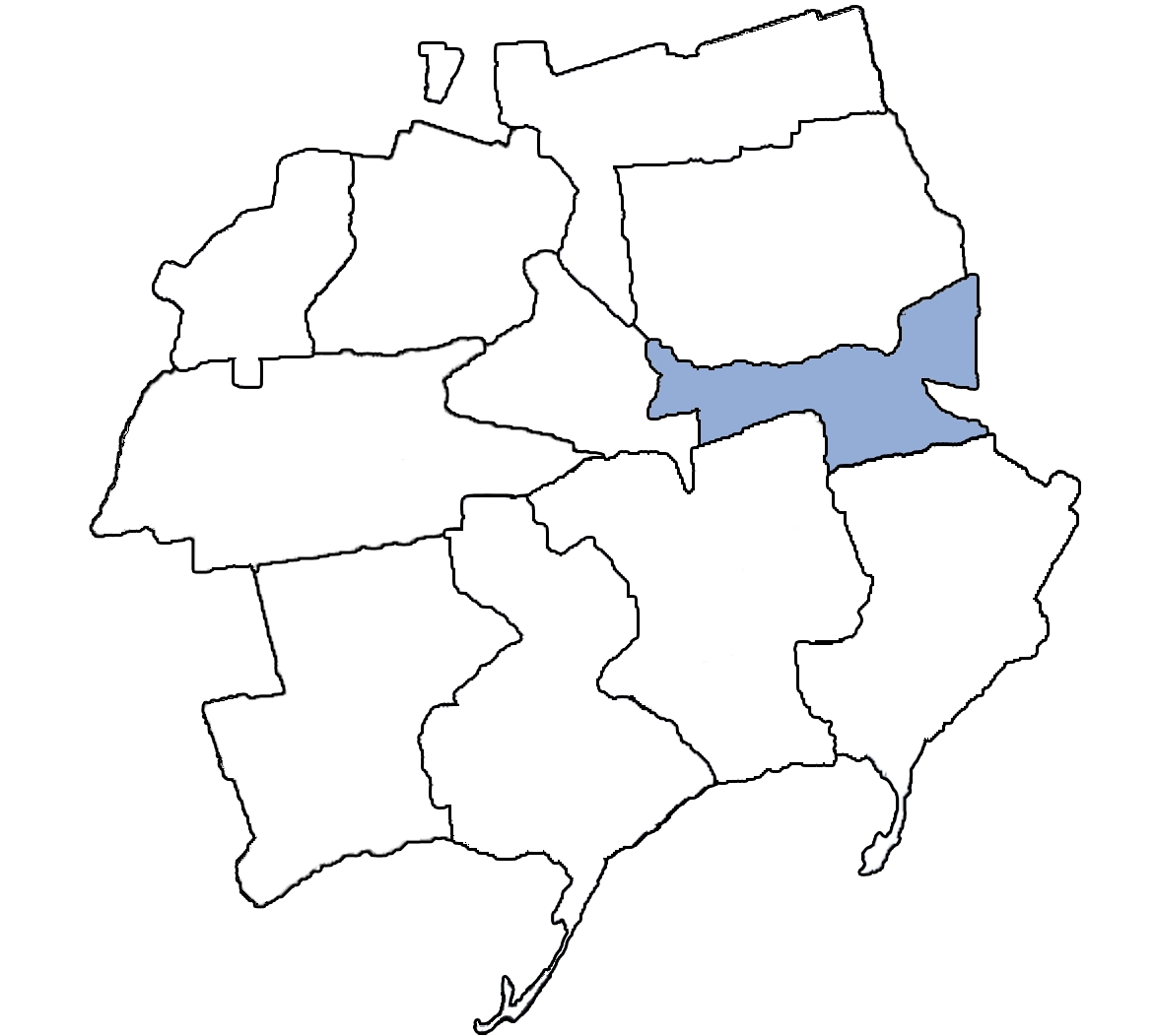 Карта Бердянської округи Берестовацького району